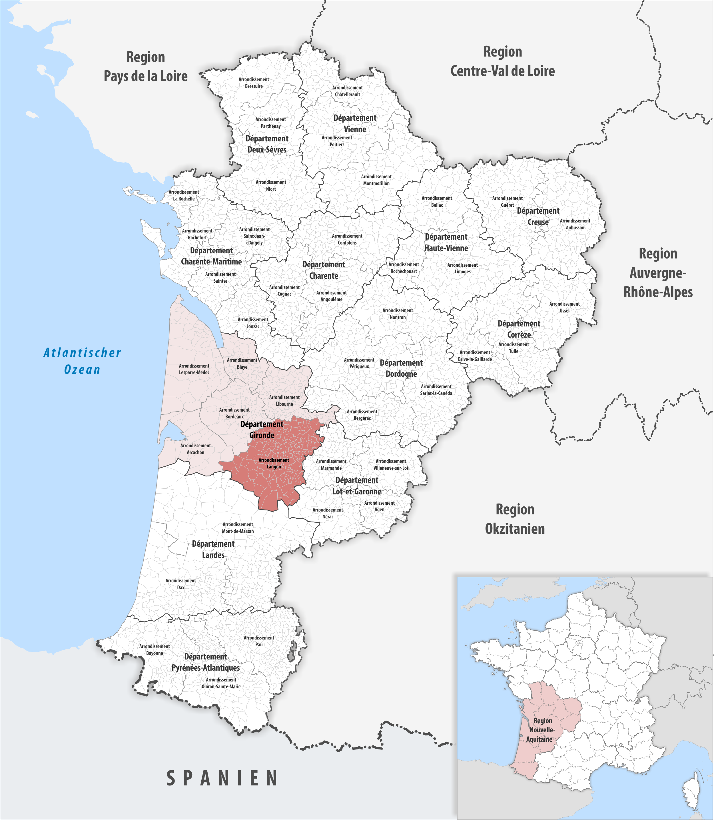 Lage des Arrondissements Langon